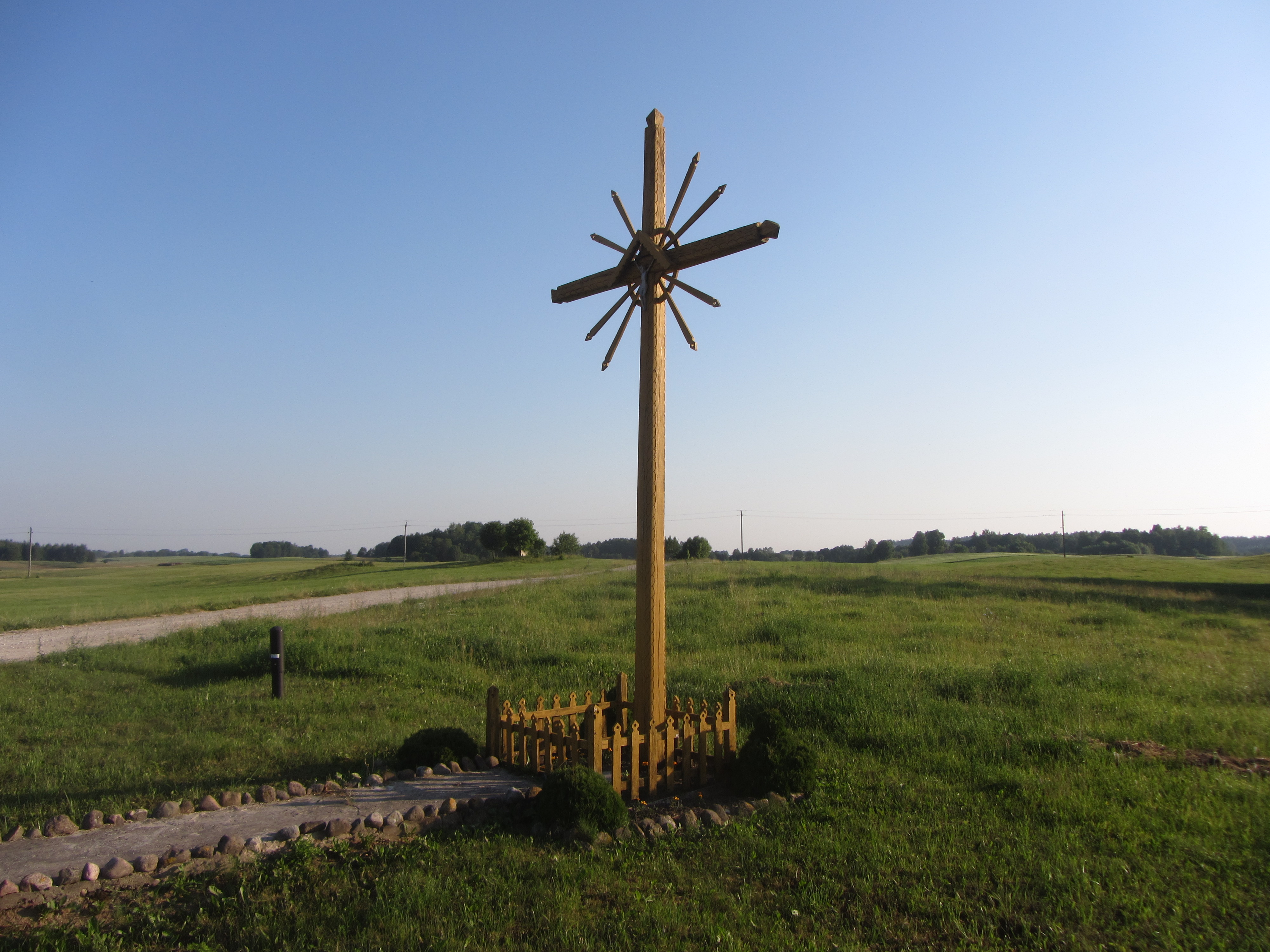 Noragėliai, Lithuania